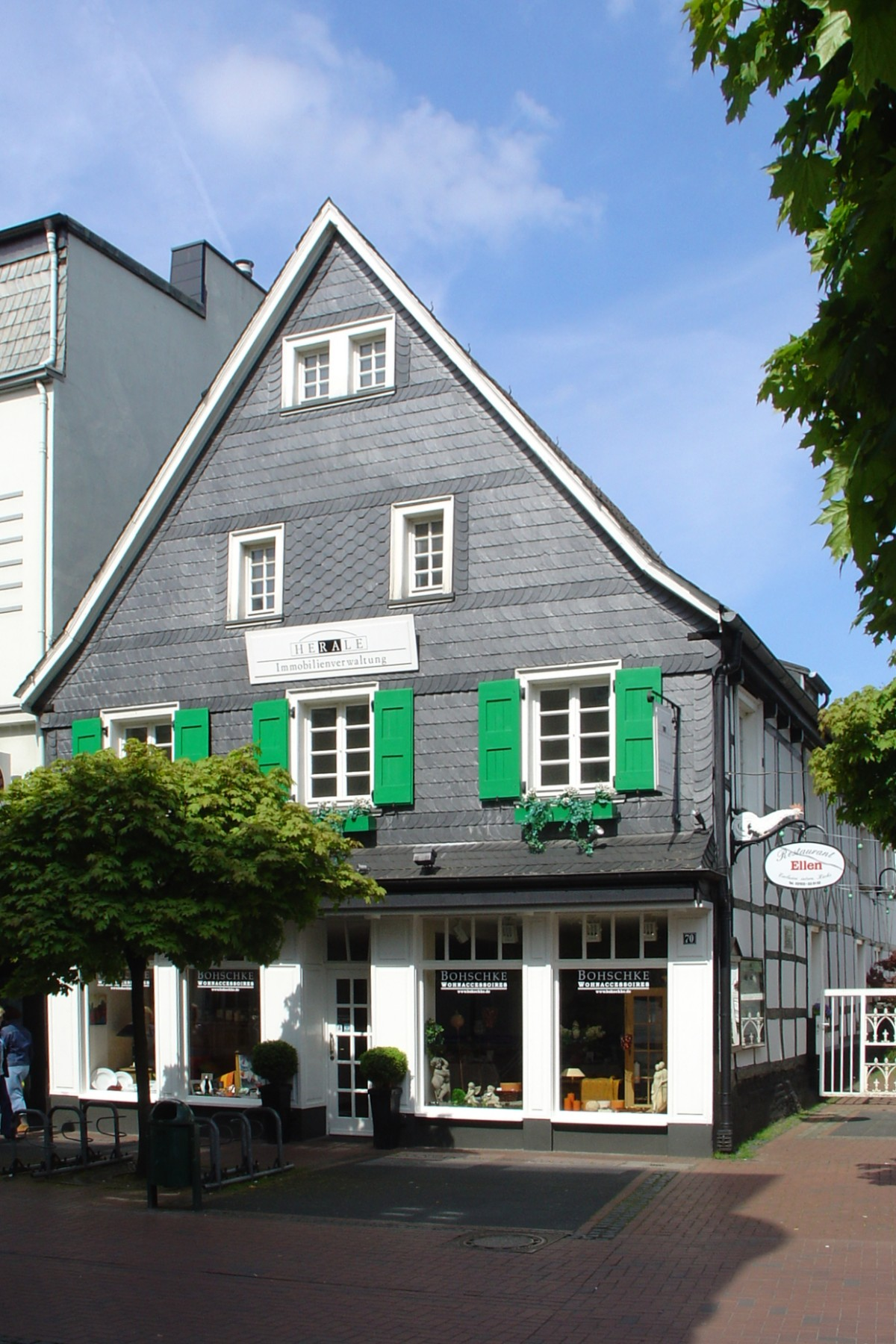 In der Großen Hacke, Hilden, Mittelstraße 70 This is a photograph of an architectural monument.